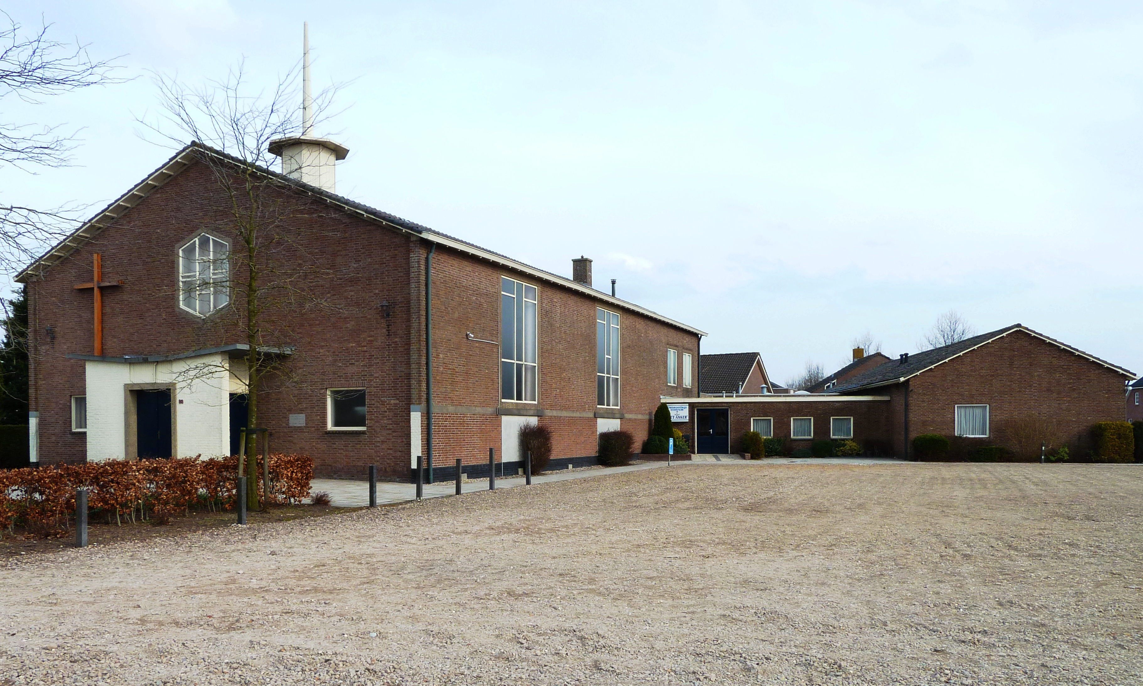 Gereformeerde kerk van Zevenhuizen (Leek, Groningen, Nederland) uit 1957.